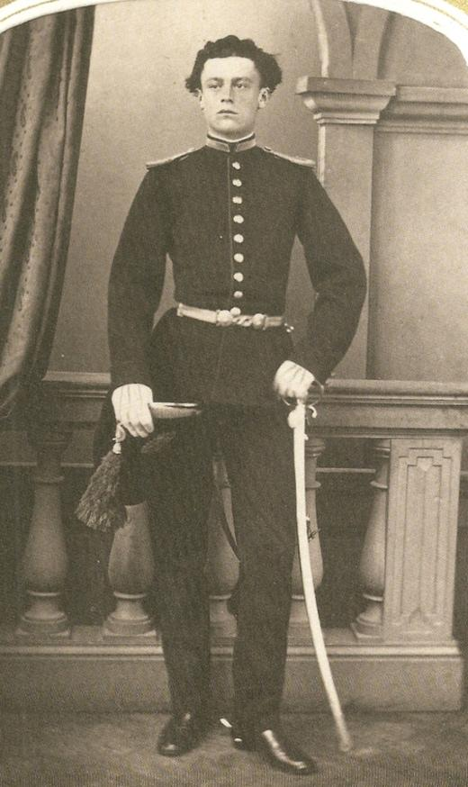 Eine Aufnahme zeigt Paul von Thurn und Taxis im Jahr 1863 in der Garnisonsstadt Würzburg